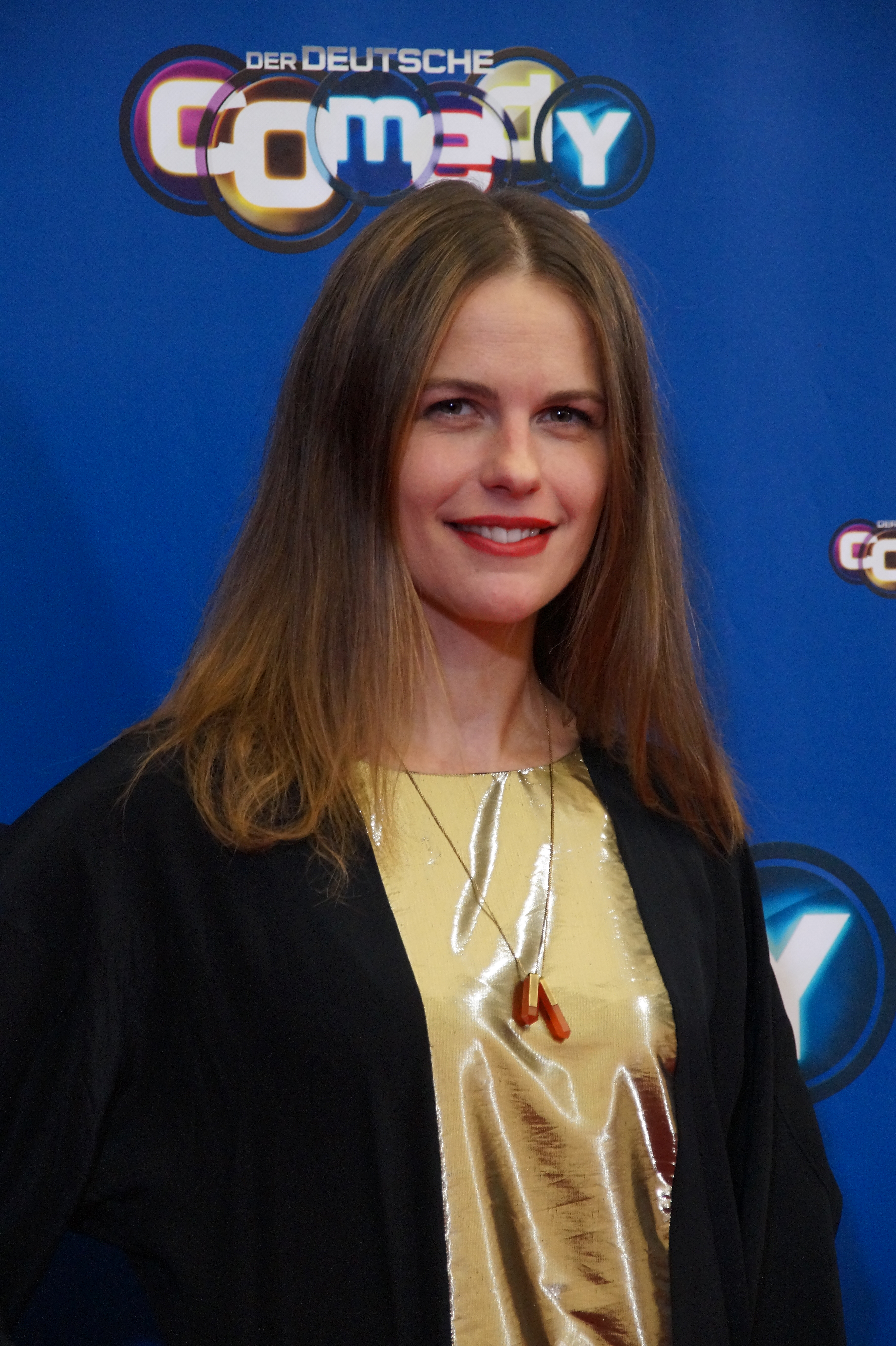 Isabell Polak beim Comedypreis 2016, im Oktober, Köln.